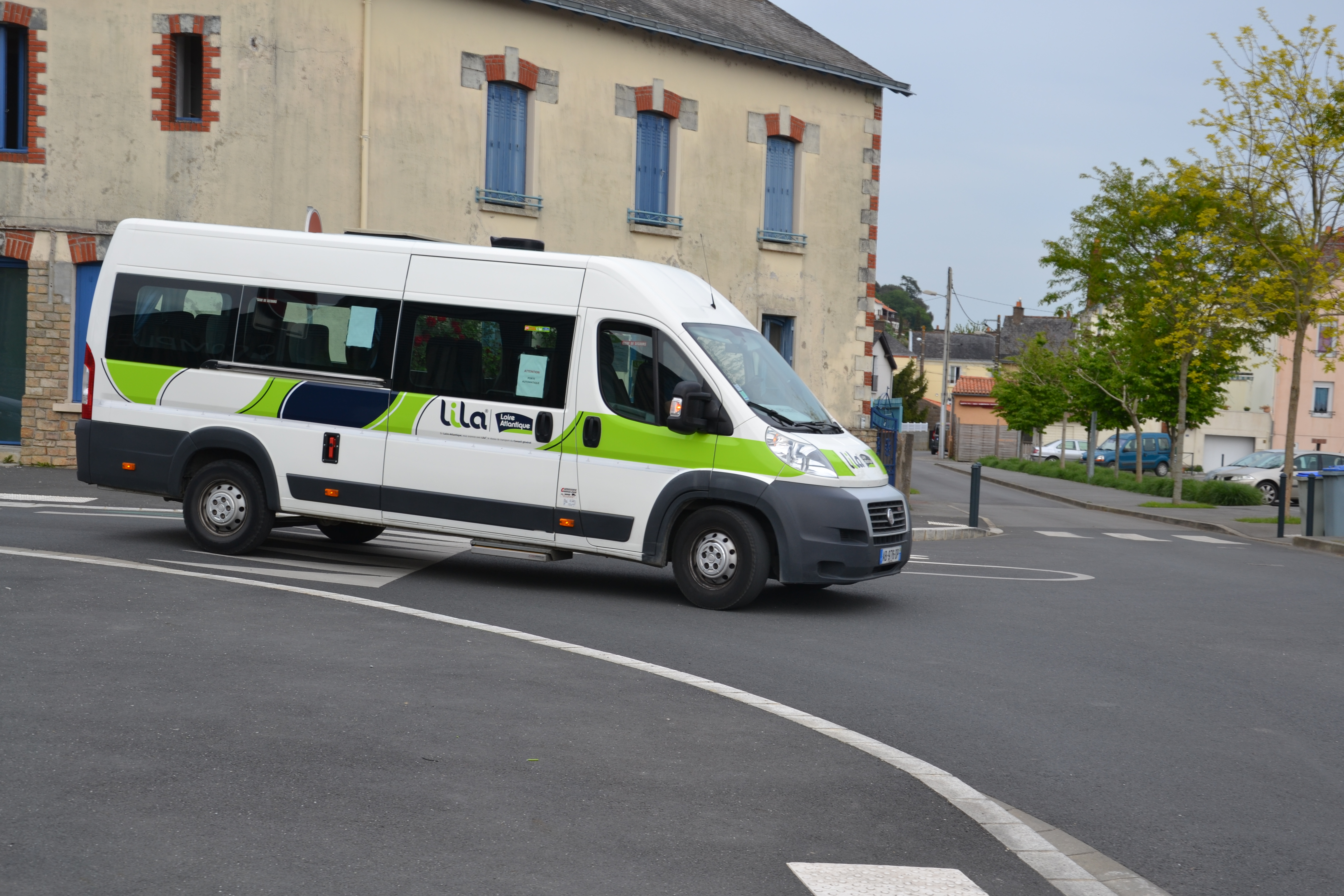 Véhicule navette utilisé sur la ligne 34 entre Mauves sur Loire et La Chapelle Basse Mer (Divate sur Loire) arrivé place de la gare